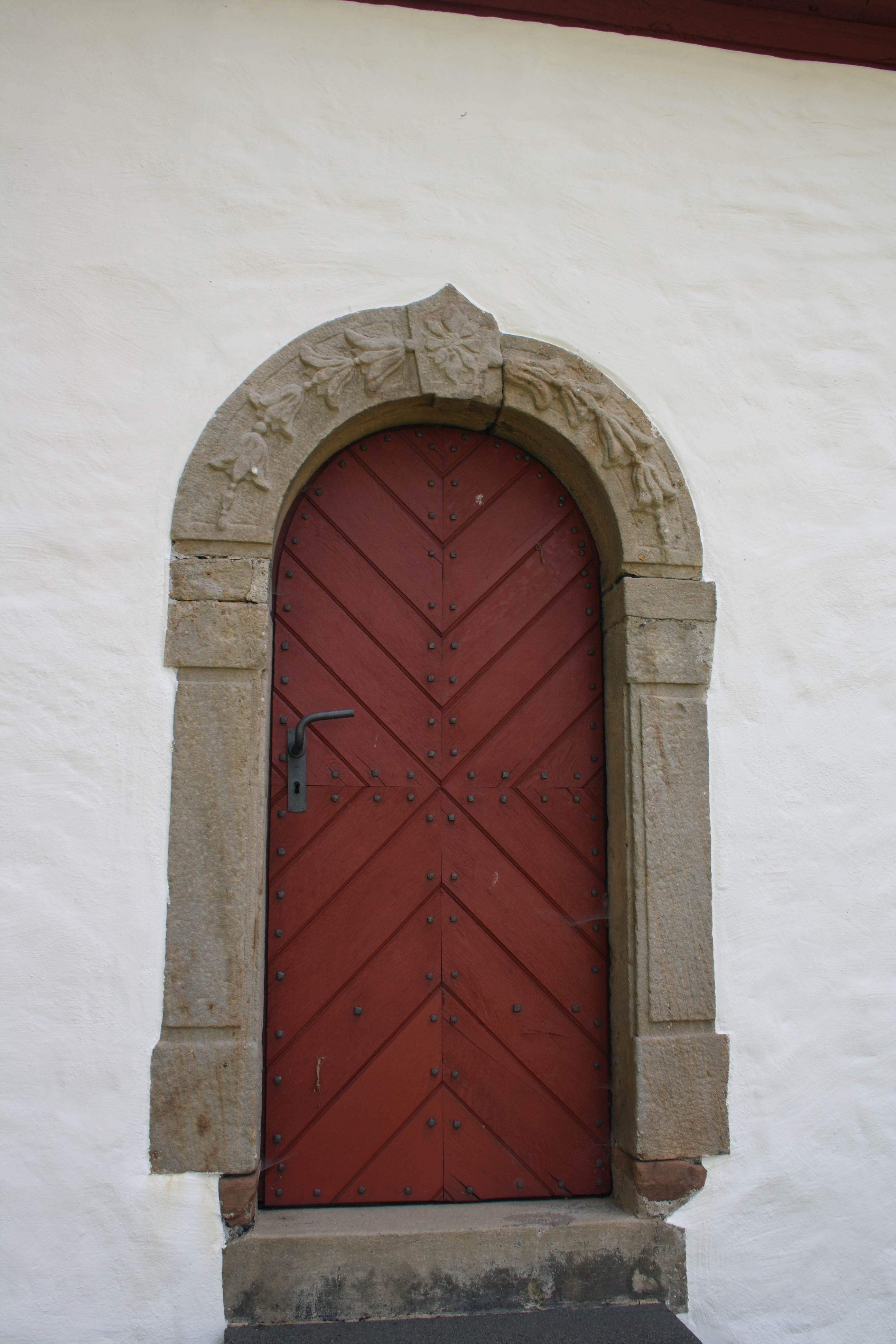 Katholische Pfarrkirche St. Peter in Zingsheim, einem Ortsteil von Nettersheim im Kreis Euskirchen (Nordrhein-Westfalen), Tür zur Sakristei